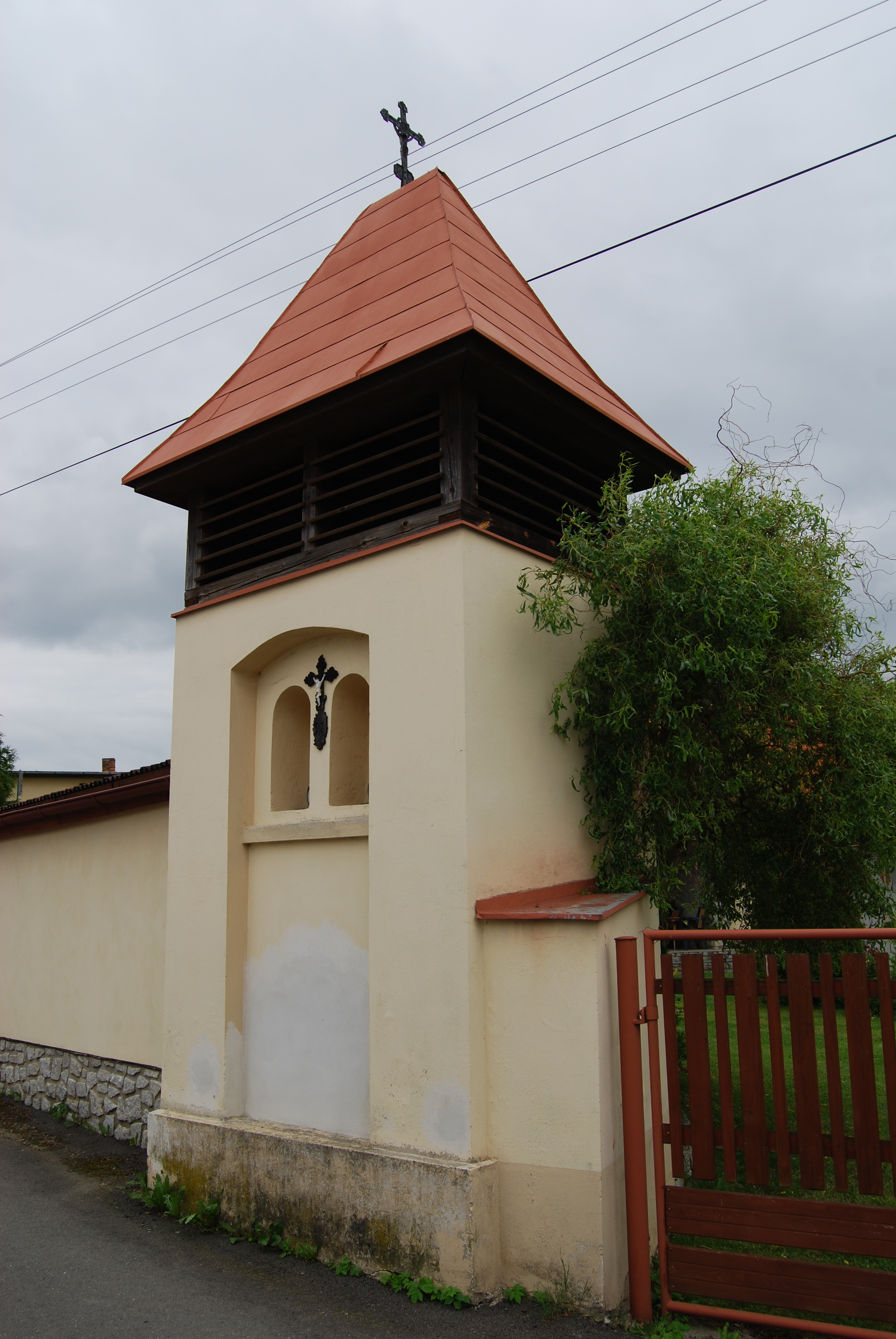 Zděná zvonice v obci. Chlumek je část obce Hrejkovice v okrese Písek. Česká republika.